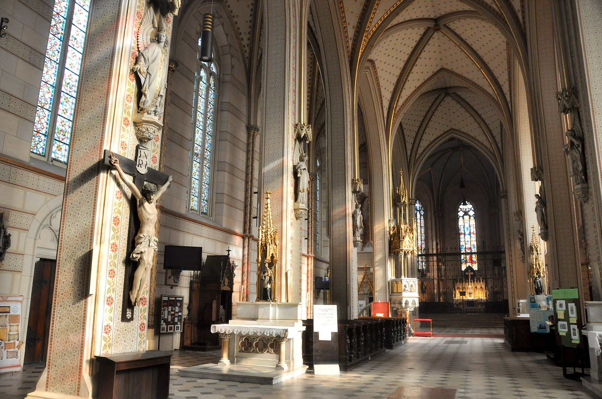 Olmuetz, St. Wenzel Kathedrale (13.Jhdt.)